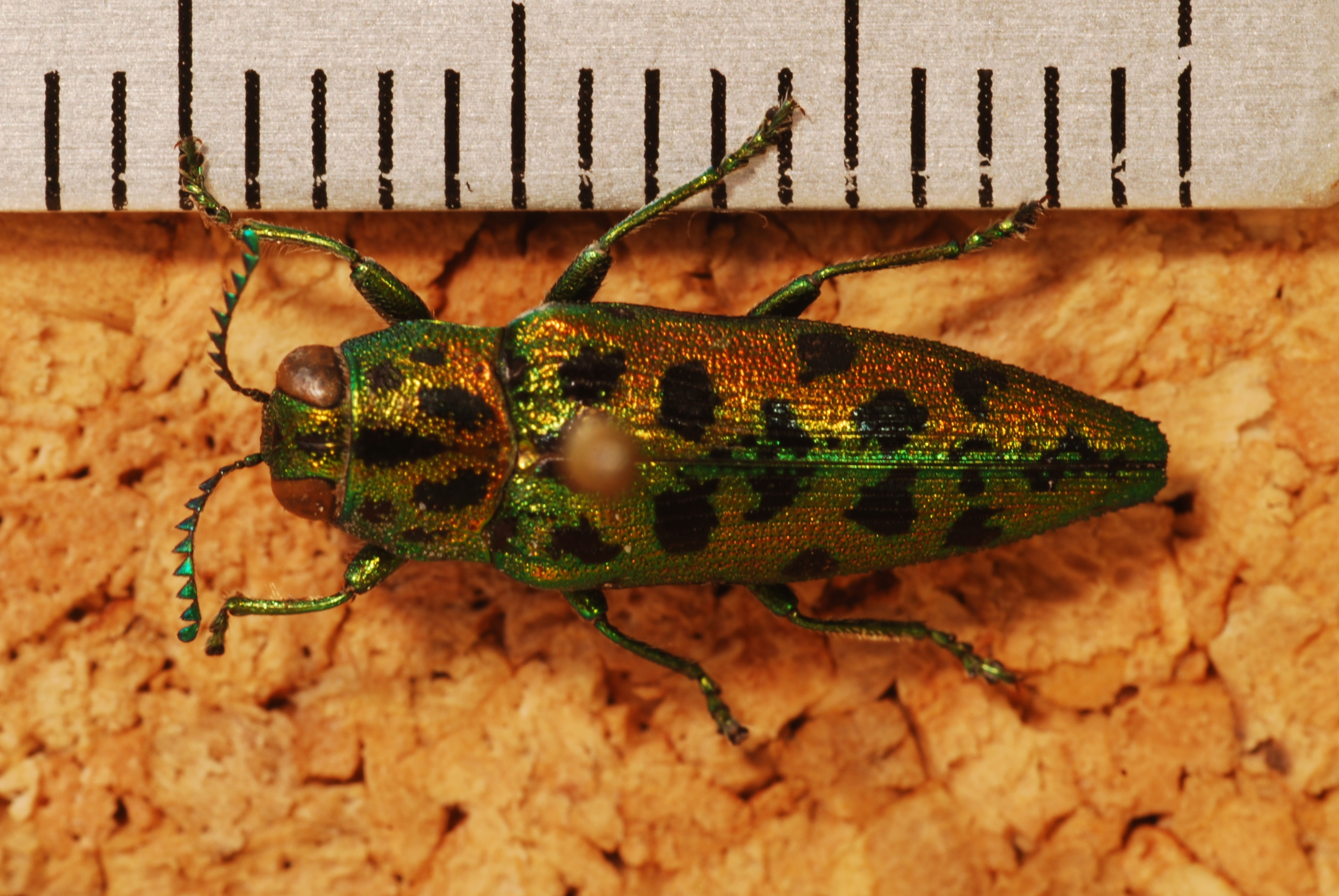 Chiang Rai, THAILAND